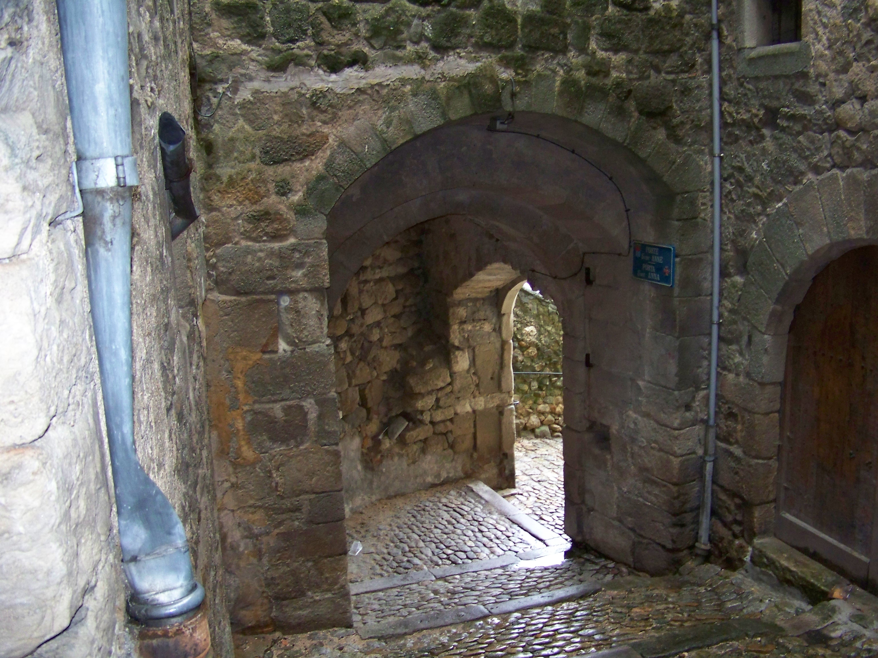 Joyeuse dans le département français de l'Ardèche : Porte Sainte-Anne.